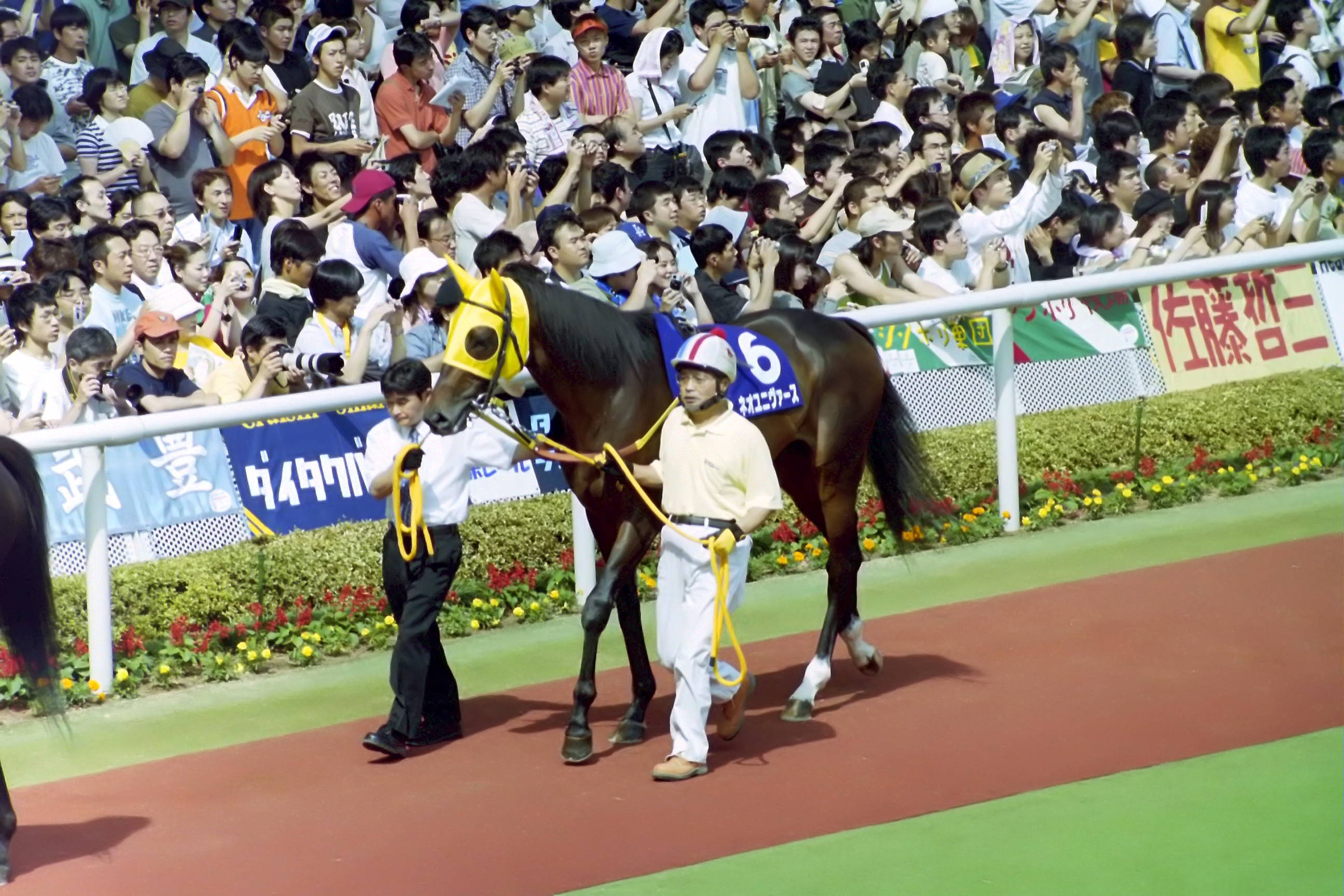 ネオユニヴァース 2003年宝塚記念